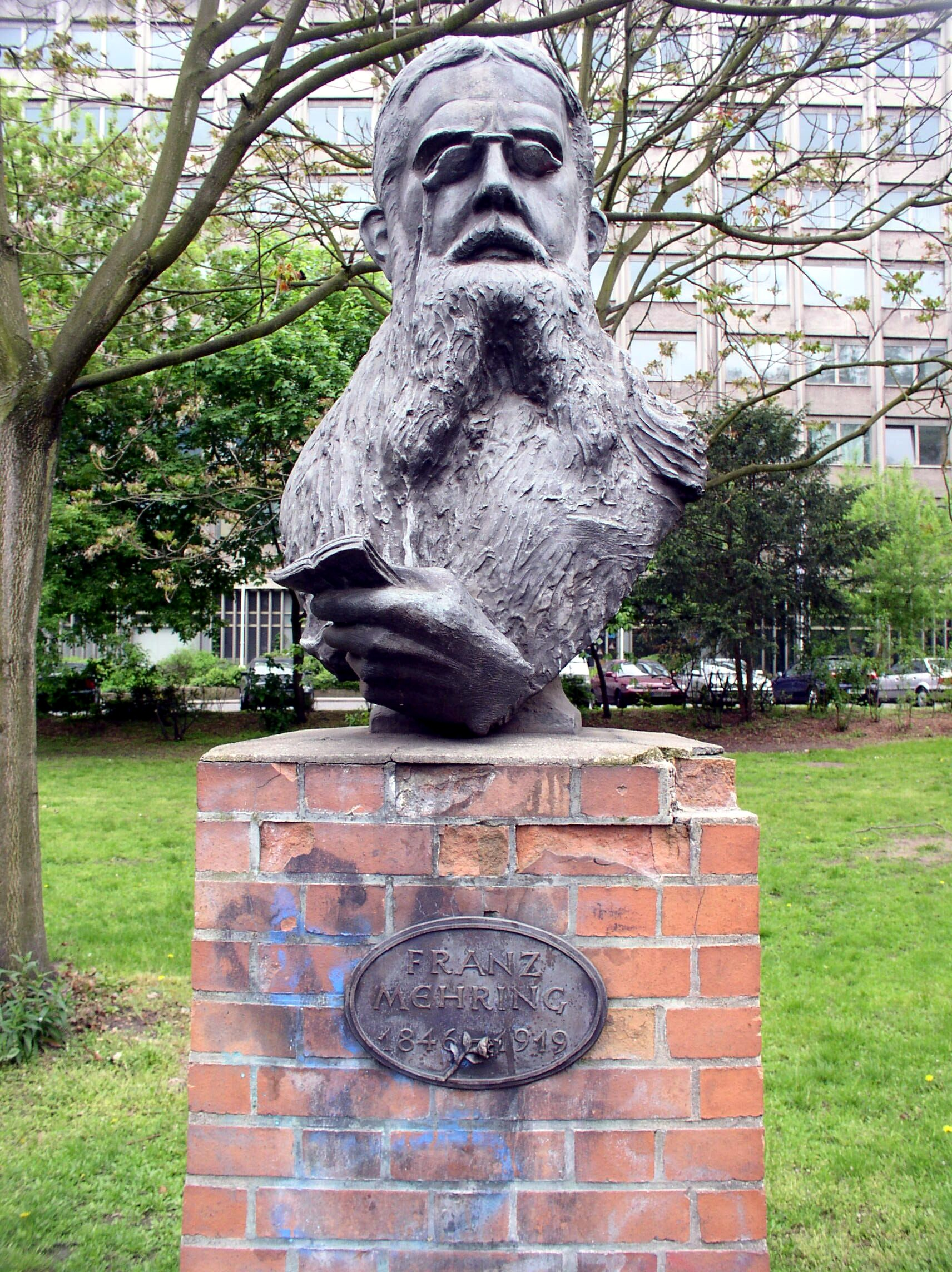 Denkmal von Franz Mehring am Franz-Mehring-Platz (Berlin-Friedrichshain) Photo von Benutzer:Necrophorus (Achim Raschka) GNU FDL